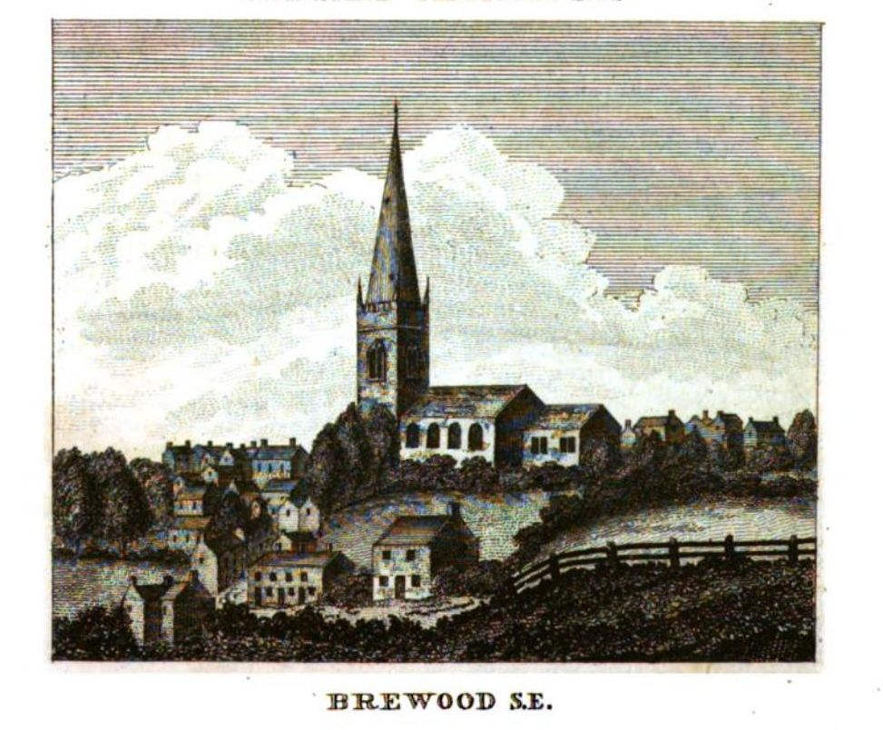 Kirch von Bredwood um 1796